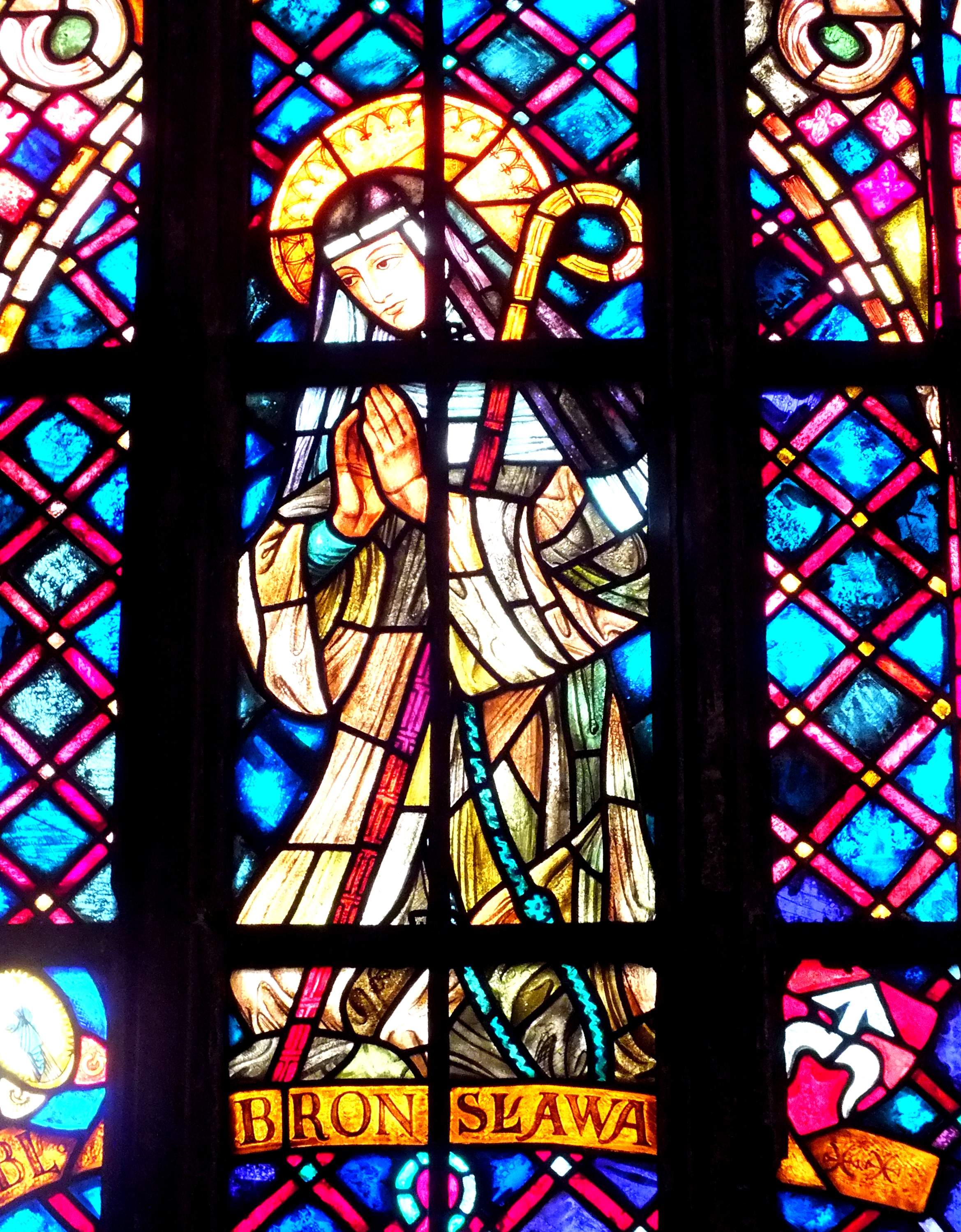 Wrocław, archikatedra pw. św. Jana Chrzciciela - fragment witraża bł. Bronisławy